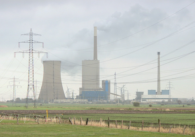 Kraftwerk Mehrum, seen from Haimar